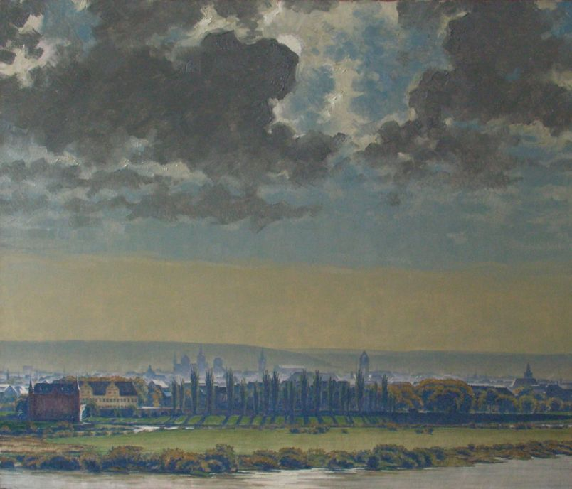 Fritz Quant: Blick auf Trier von Westen, um 1922, Öl au fLeinwand, 83 x 97 cm (Stadtmuseum Simeonstift Trier)